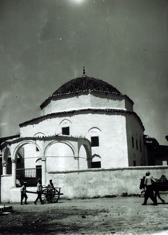 DMM A04 Mosque behind the palace in Durrës. ca. 1914. / Xhamia prapa pallatit mbretëror në Durrës. Rreth 1914.